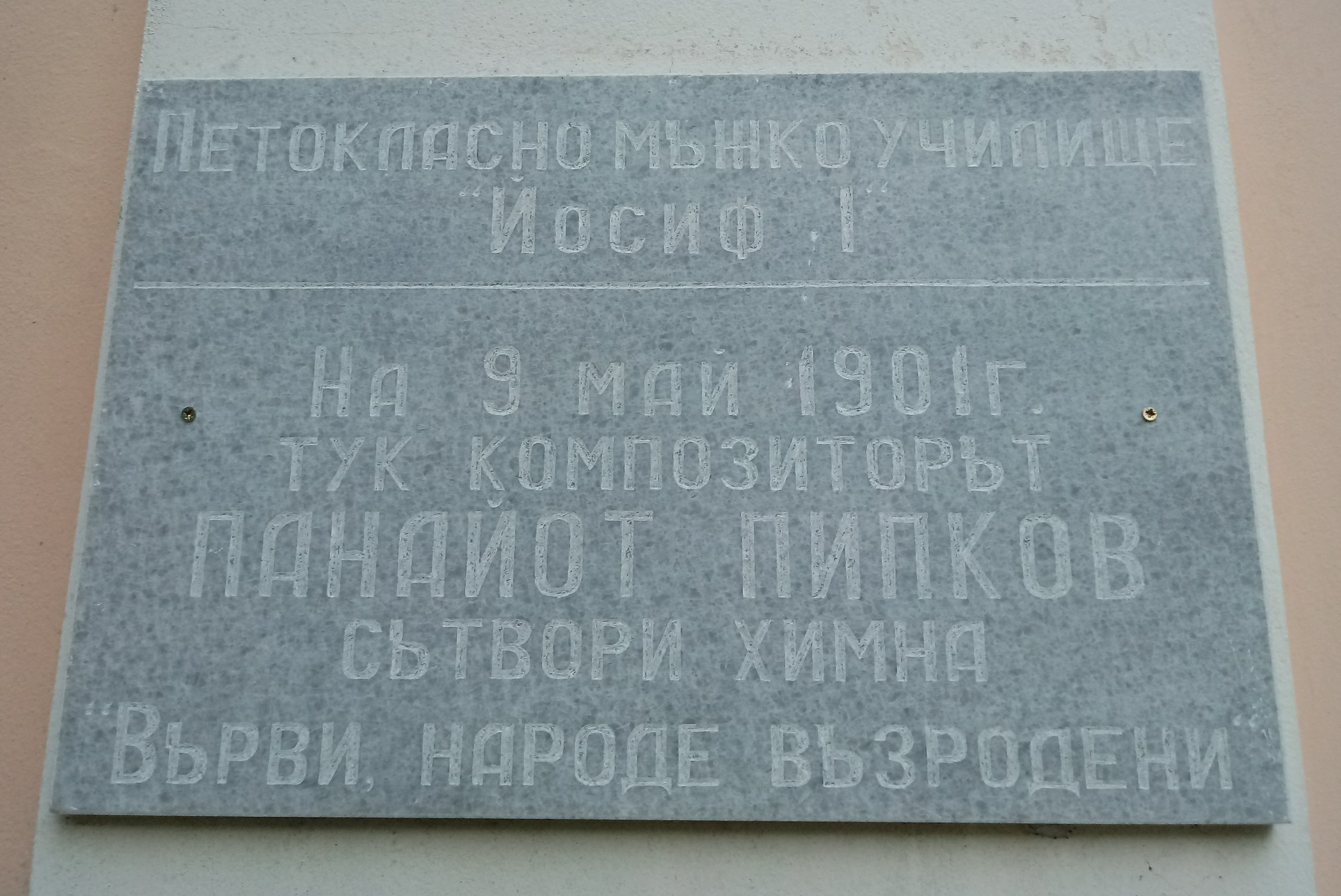 Panayot Pipkov memorial plaque, Vasil Levski Str, Lovech